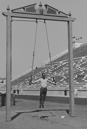 Weingartner at rings